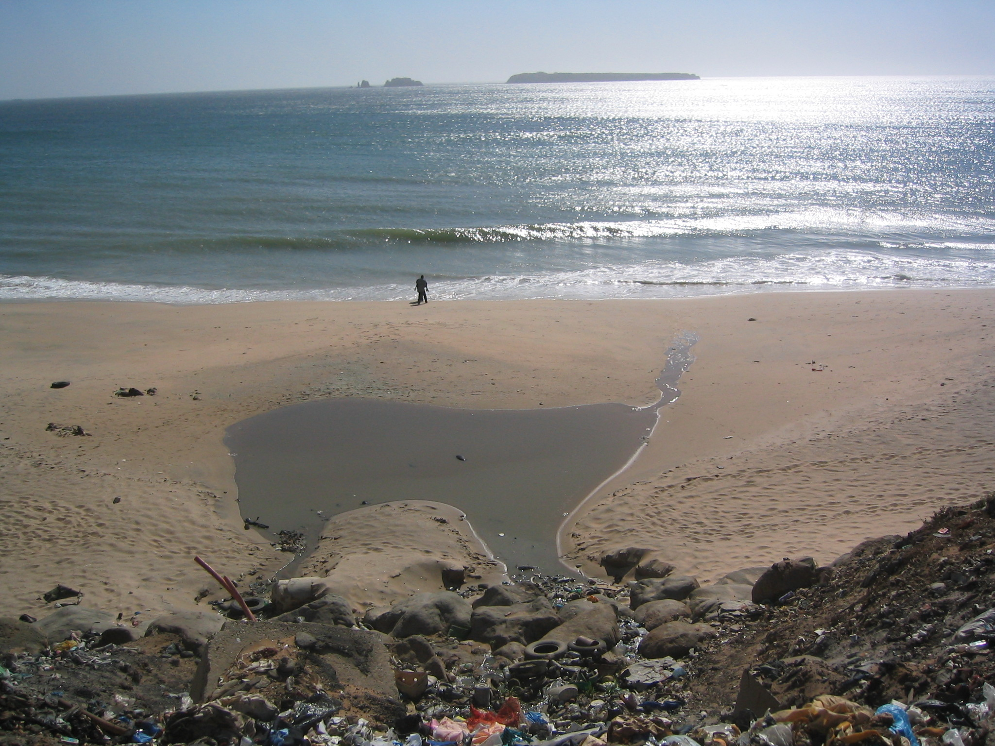 Détritus sur fond de panorama (Dakar, Corniche Ouest, Sénégal) ; au loin, les îles de la Madeleine